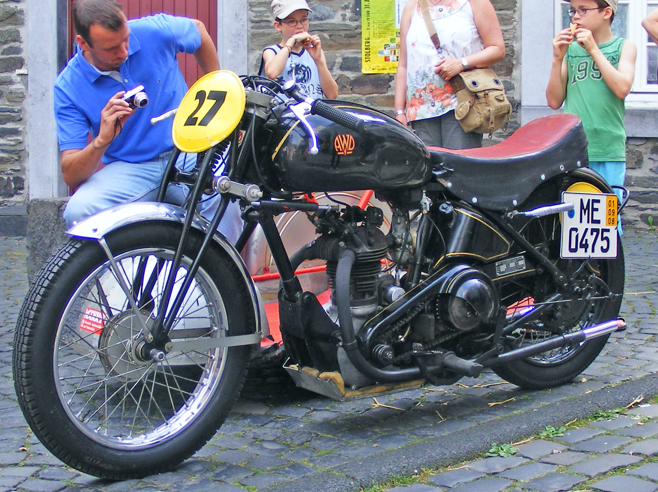 AWD Oldtimer Motorrad Monschau 2008